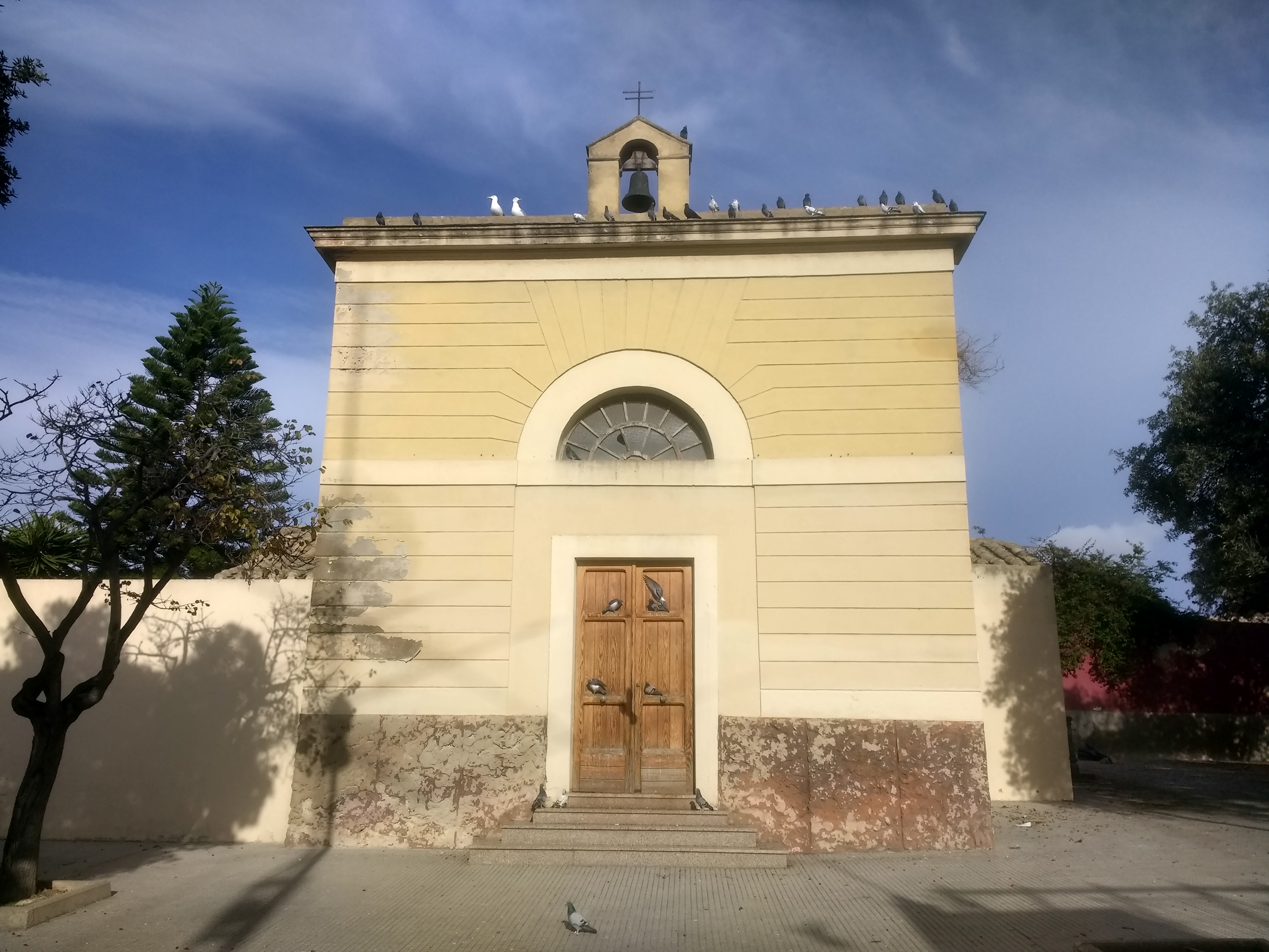 Foto scattata a Pirri nel dicembre 2019